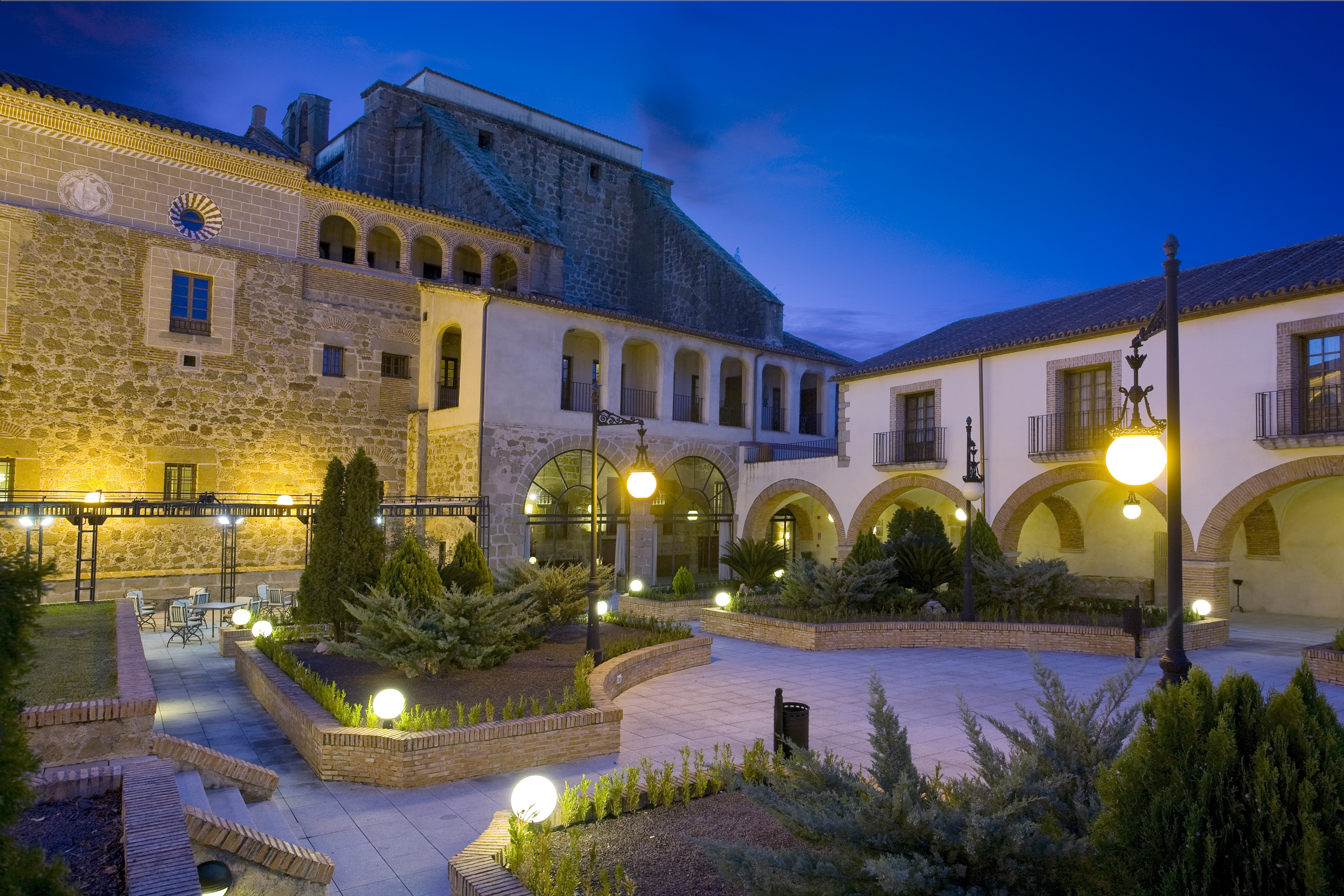 Parador de Plasencia